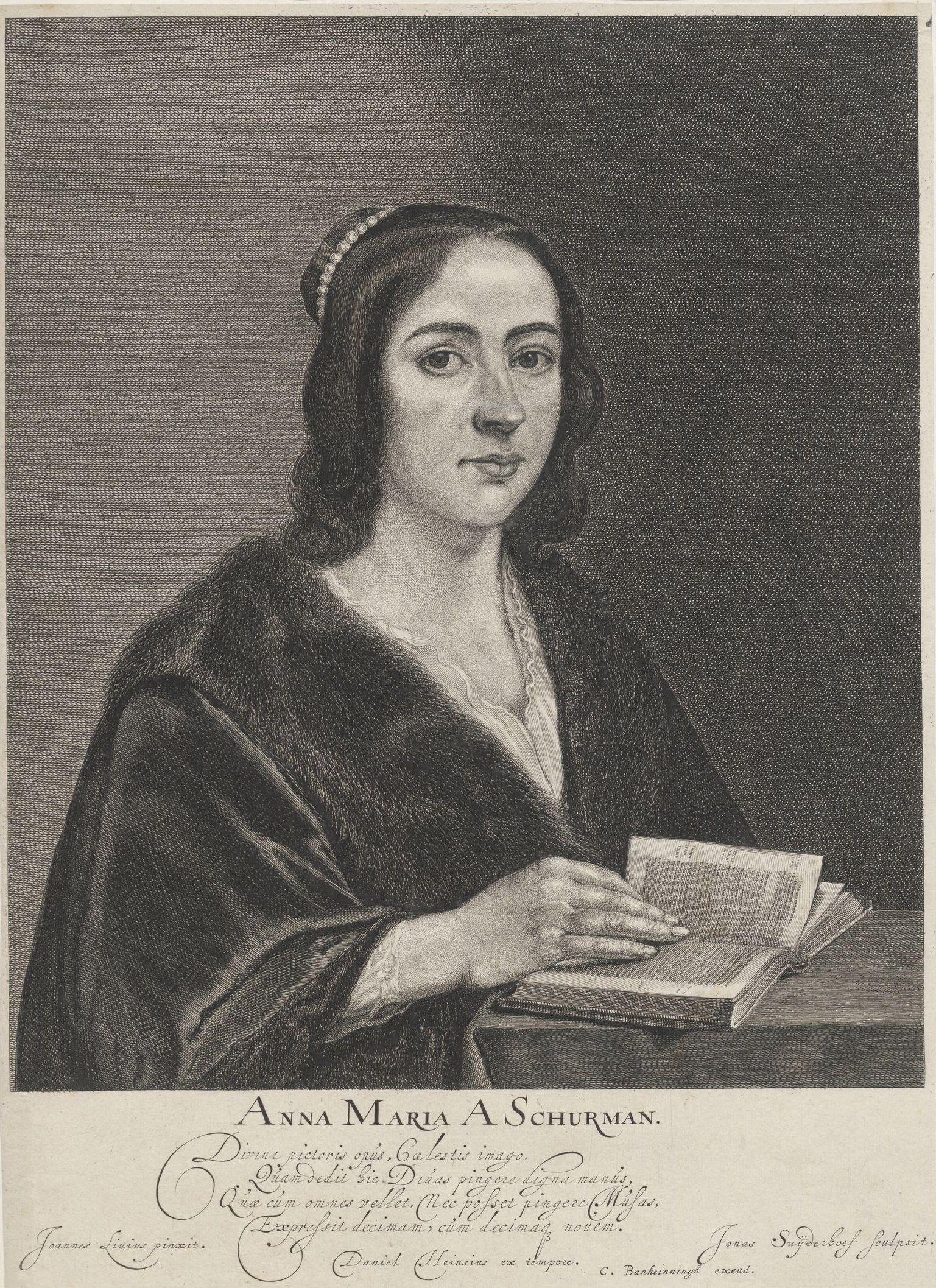 Engraving by Jonas Suyderhoef.